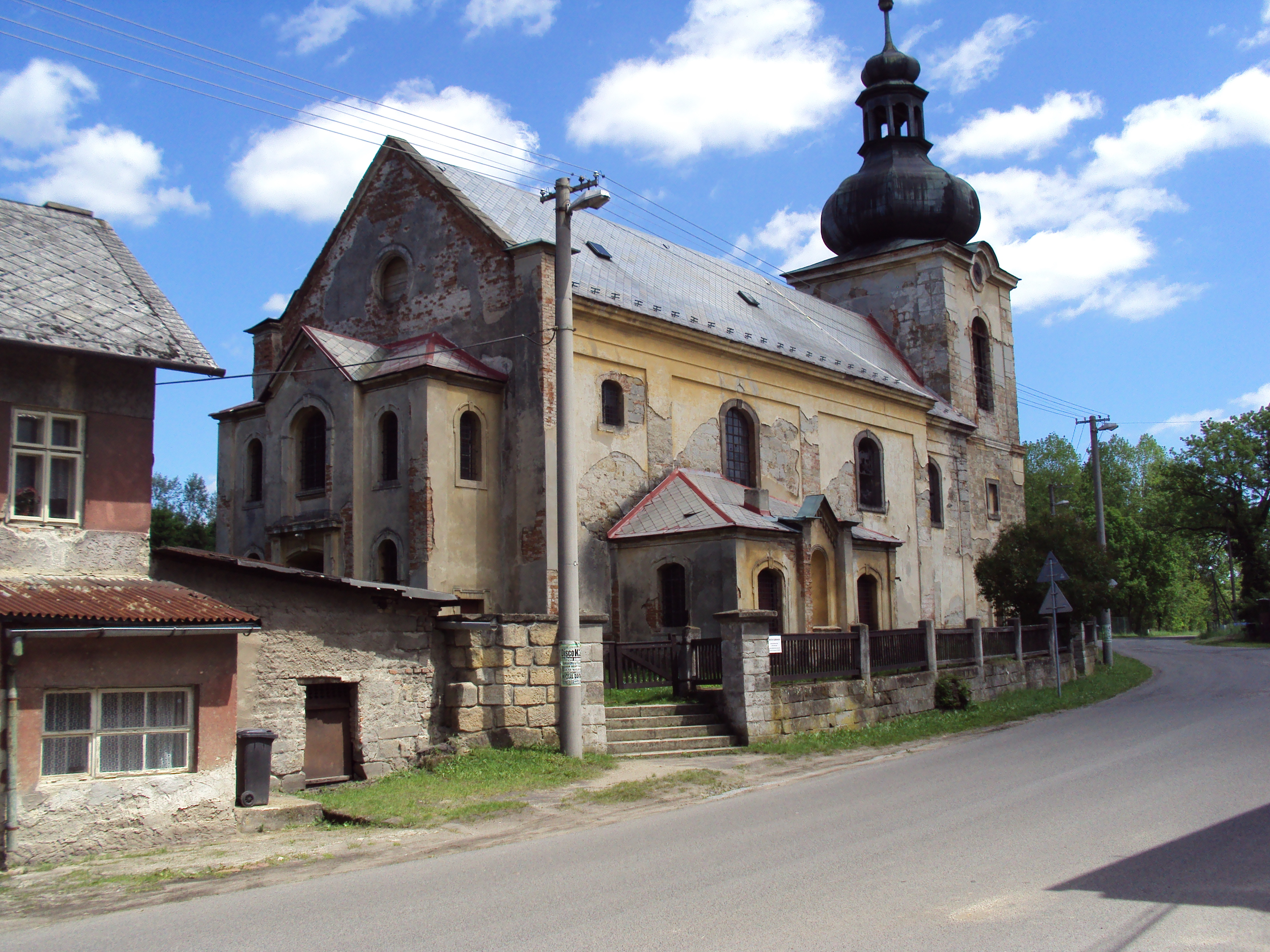 Kostel svatého Jiří v Dobranově, vesnici u České Lípy